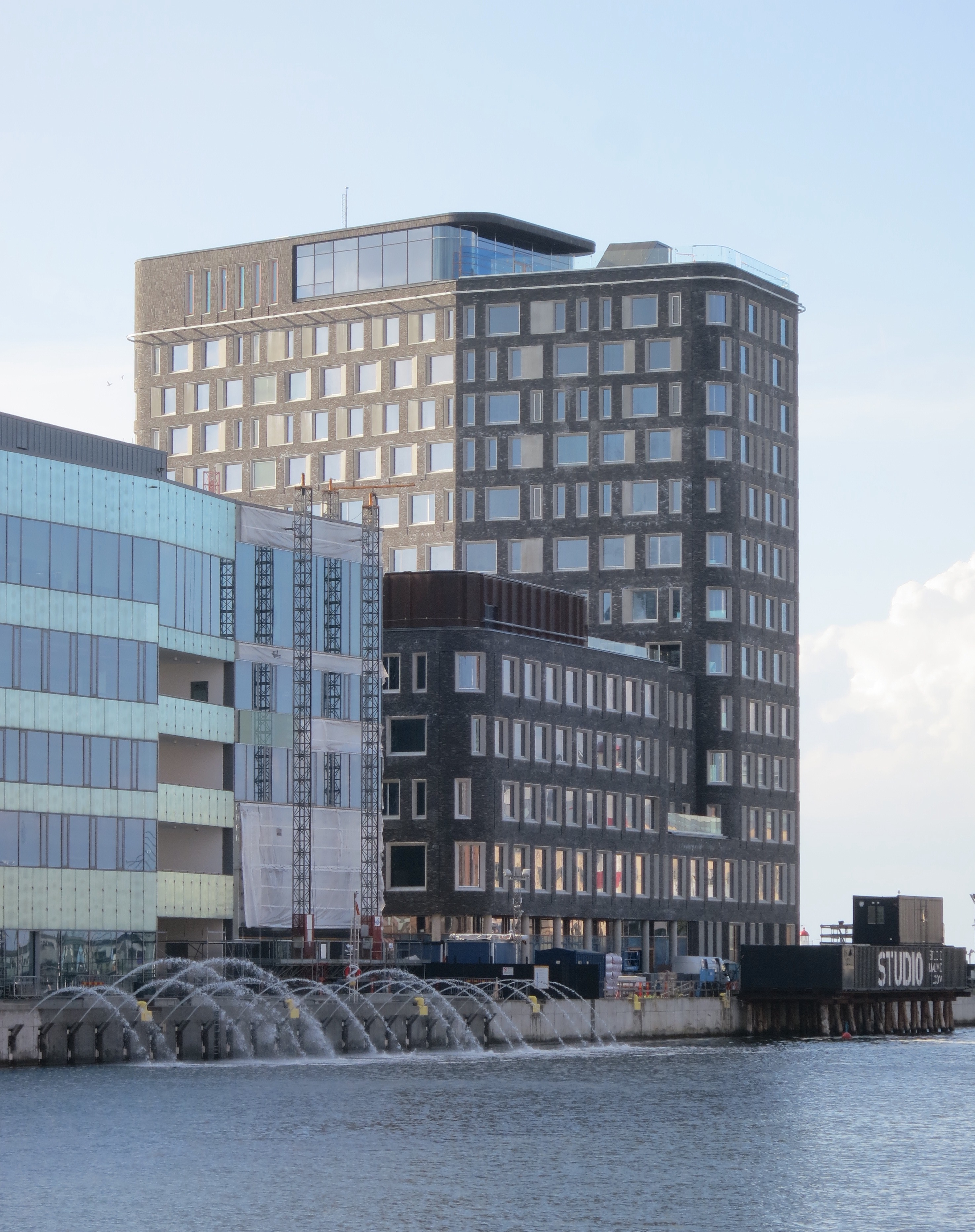 Studio, Tyfonen 1, Malm